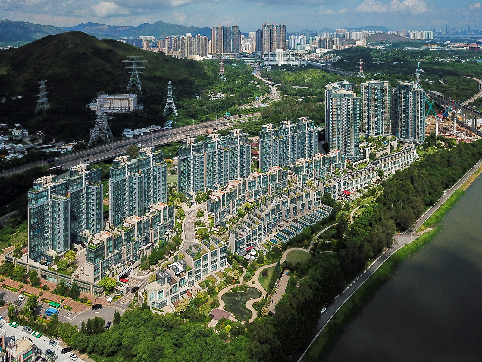 爾巒